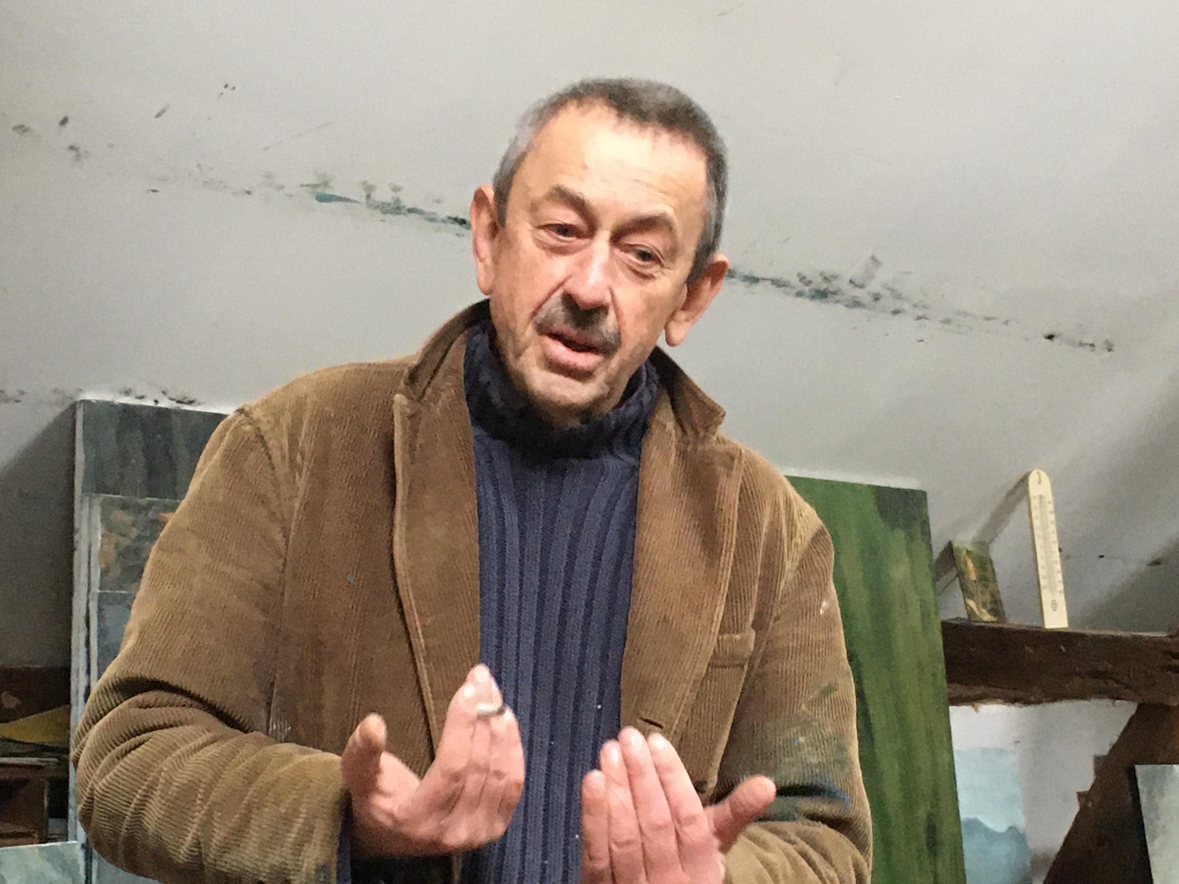 Portrait de l'artiste en 2020